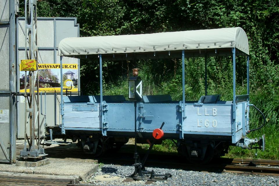 Offener, für den Personentransport umgerüsteter Güterwagen L2 60 (Aussichtswagen) der ehemaligen Leuk–Leukerbad-Bahn (LLB), heute Verkehrsbetriebe Leuk–Leukerbad und Umgebung (LLB), bei der Museumsbahn Blonay-Chamby in Chamby-Musée (Chaulin) im Sommer 2010.